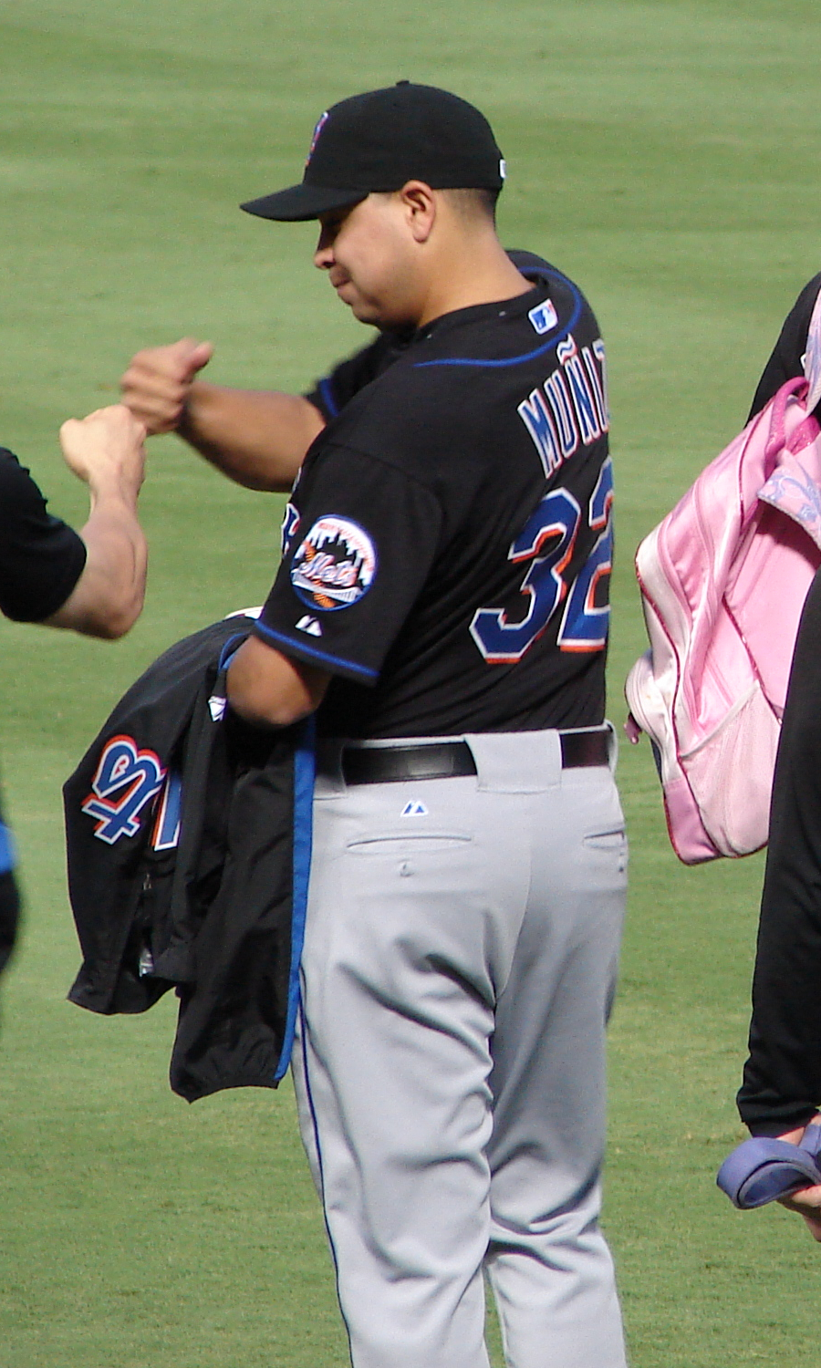 Carlos Muñiz